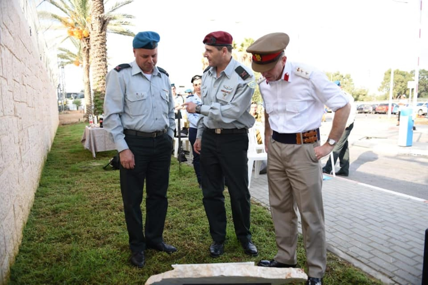 חץ הדורות במחנה גדעונים. הנספח הצבאי הבריטי בישראל קולונל ג'יימס פריסט, רח"ט קשרי חוץ בצה"ל תא"ל ארז מייזל וקצין הקשר והתקשוב הראשי (קשר"ר) תא"ל יריב ניר בטקס במחנה צריפין, אוקטובר 2019